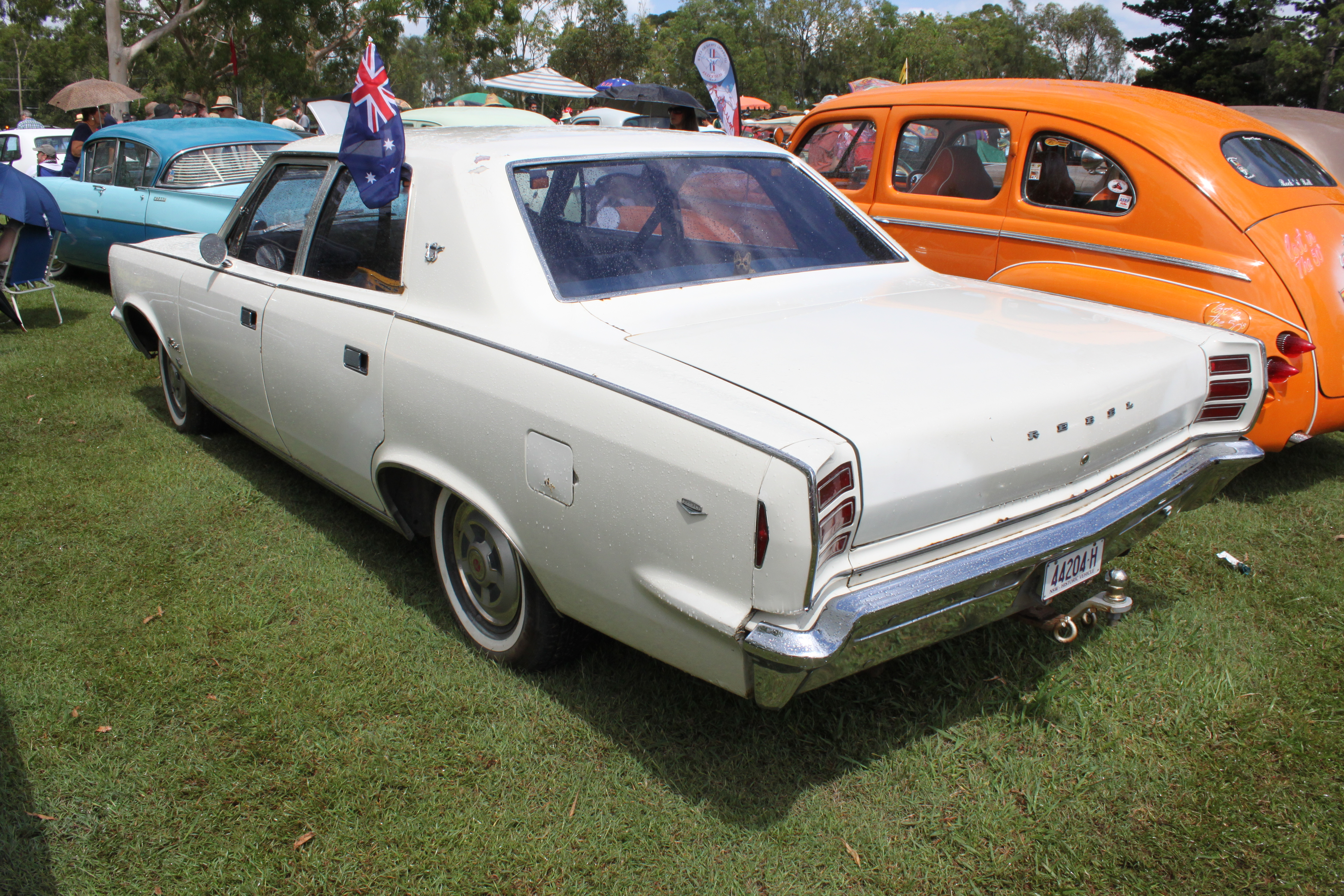 CARnivale, Parramatta Park, NSW Australia Day 2016